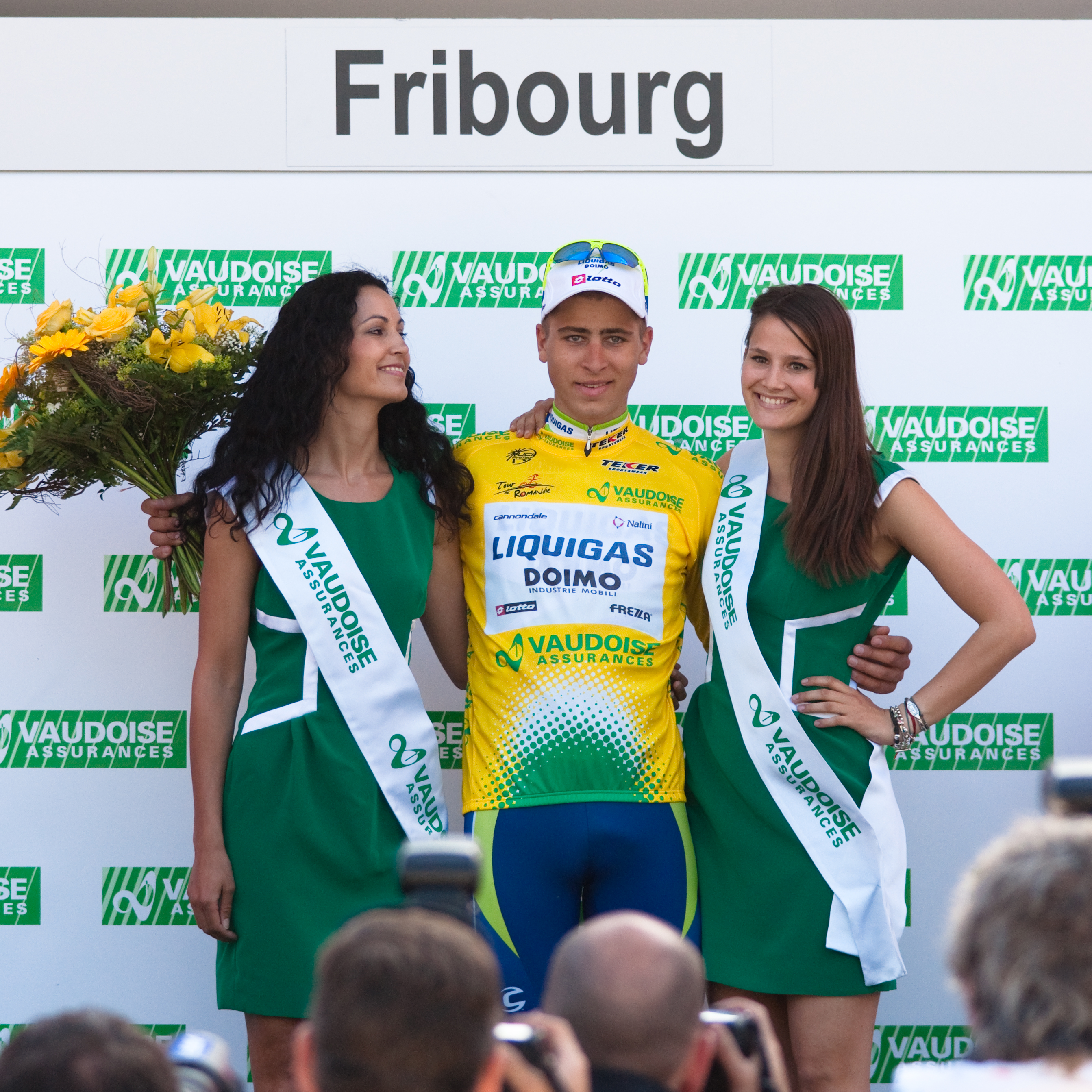 Peter Sagan na závodě Kolem Romandie v roce 2010.